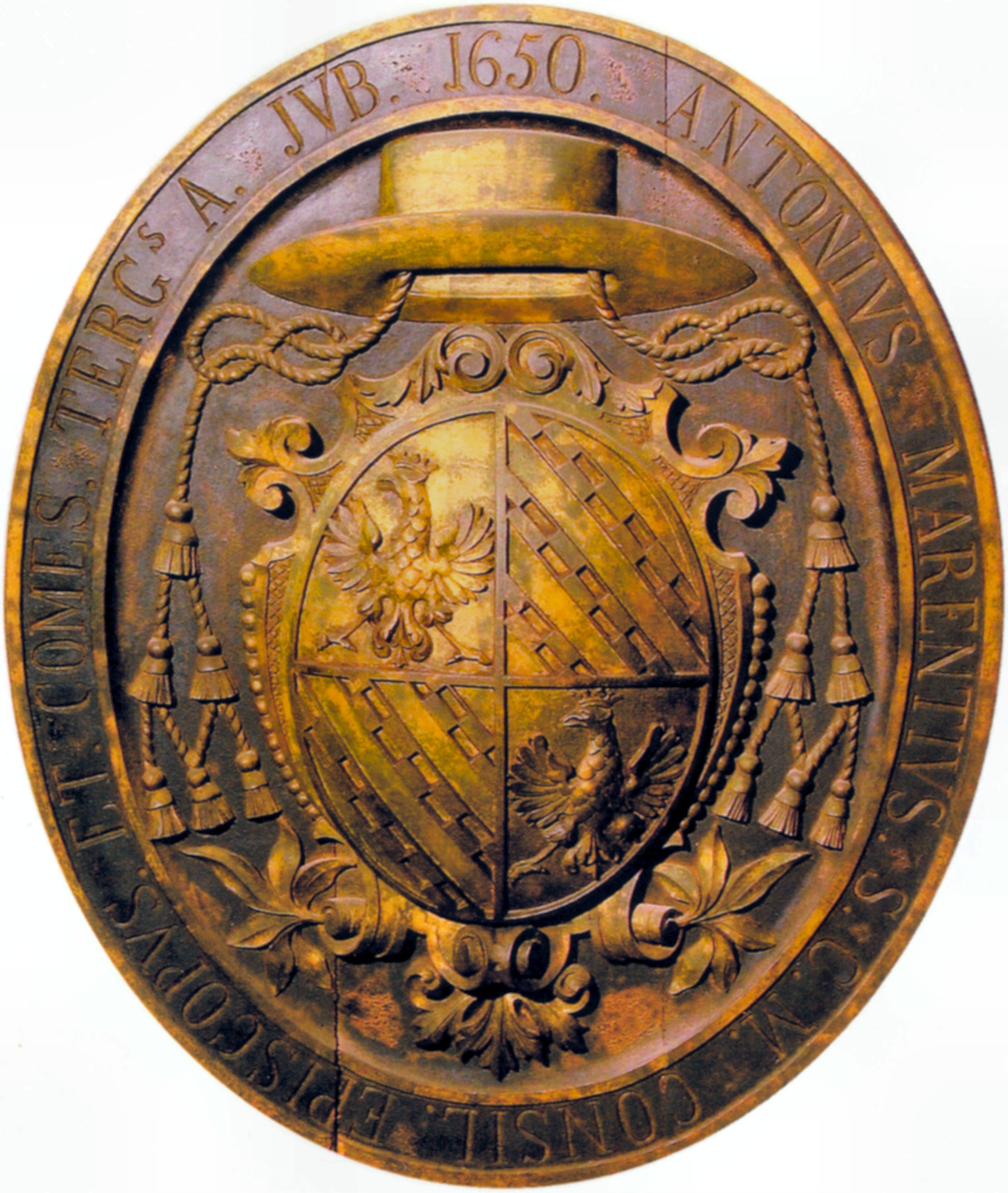 Holzwappen für Bischof Anton Marenzi in der Kathedrale San Giusto in Triest, 1650